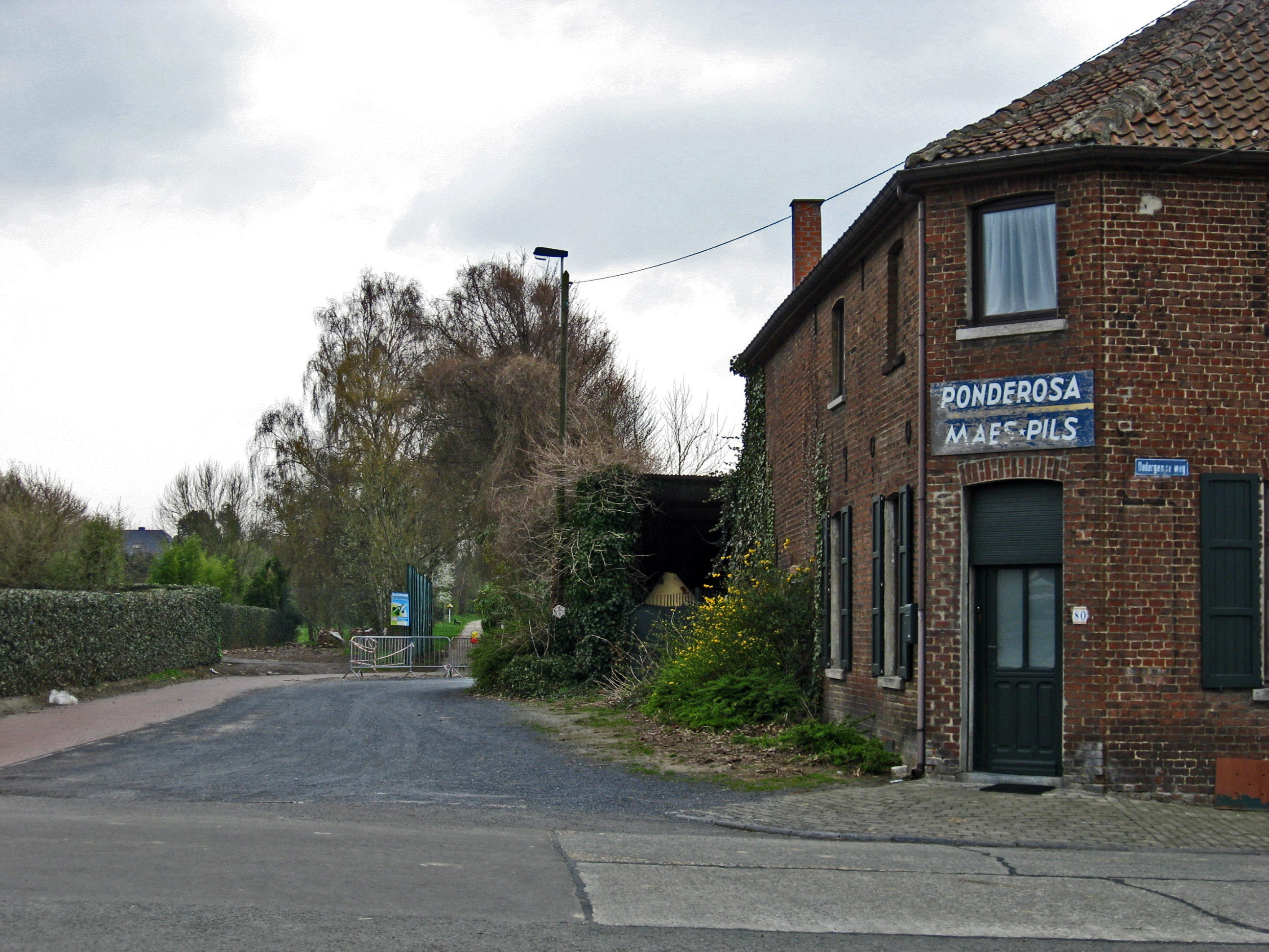 Vroegere trambaan Sterrebeek - Vossem in de gemeente Tervuren. Hier was vroeger de tramhalte Moorsel met een kroeg, die nu niet meer in gebruik is. Vanaf hier wordt het tracé ook gebruikt als fietspad.